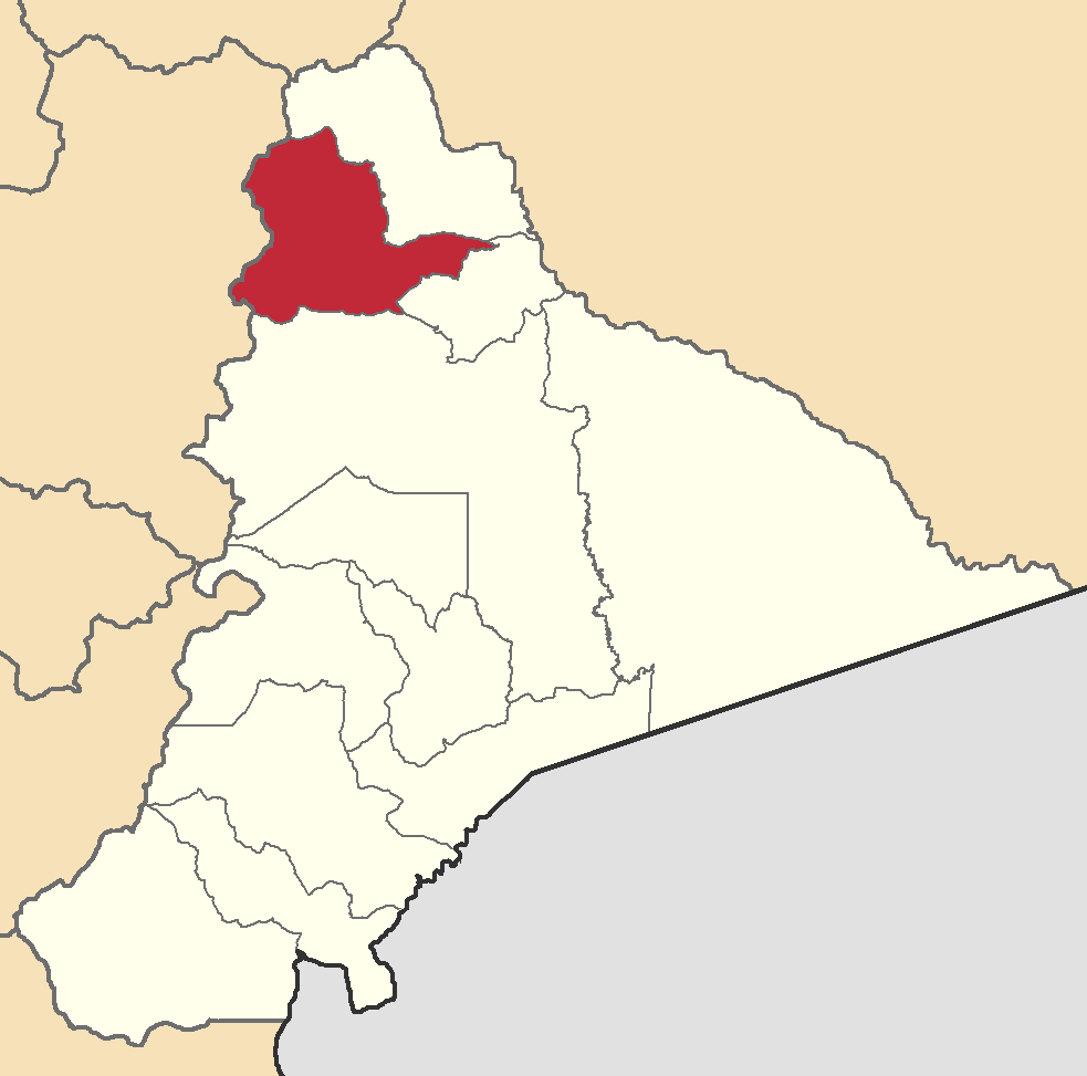 Mapa localizador del cantón en Morona-Santiago, Ecuador